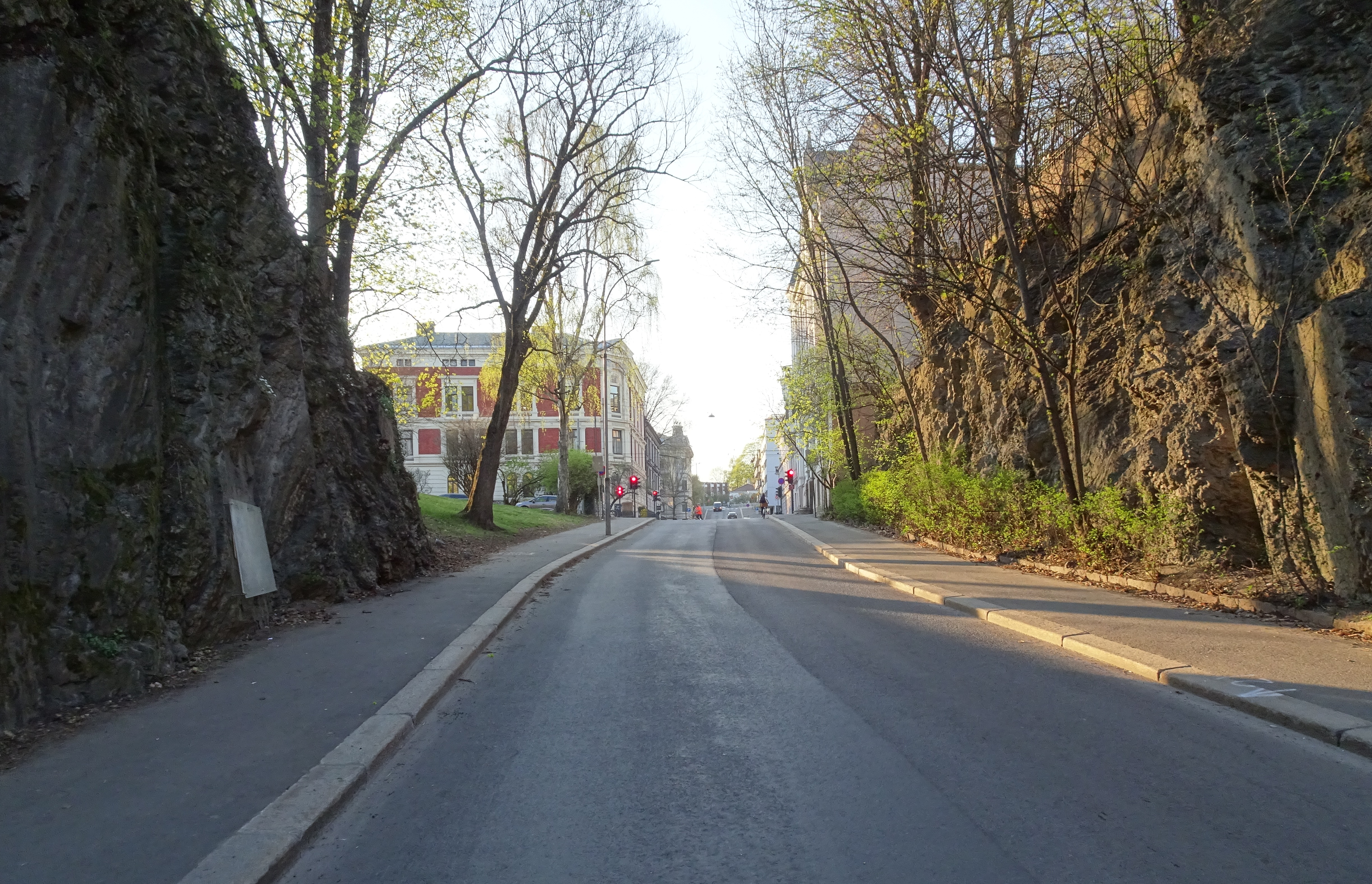 Uranienborgveien nordvestover gjennom skjæringen ved Uranienborgparken